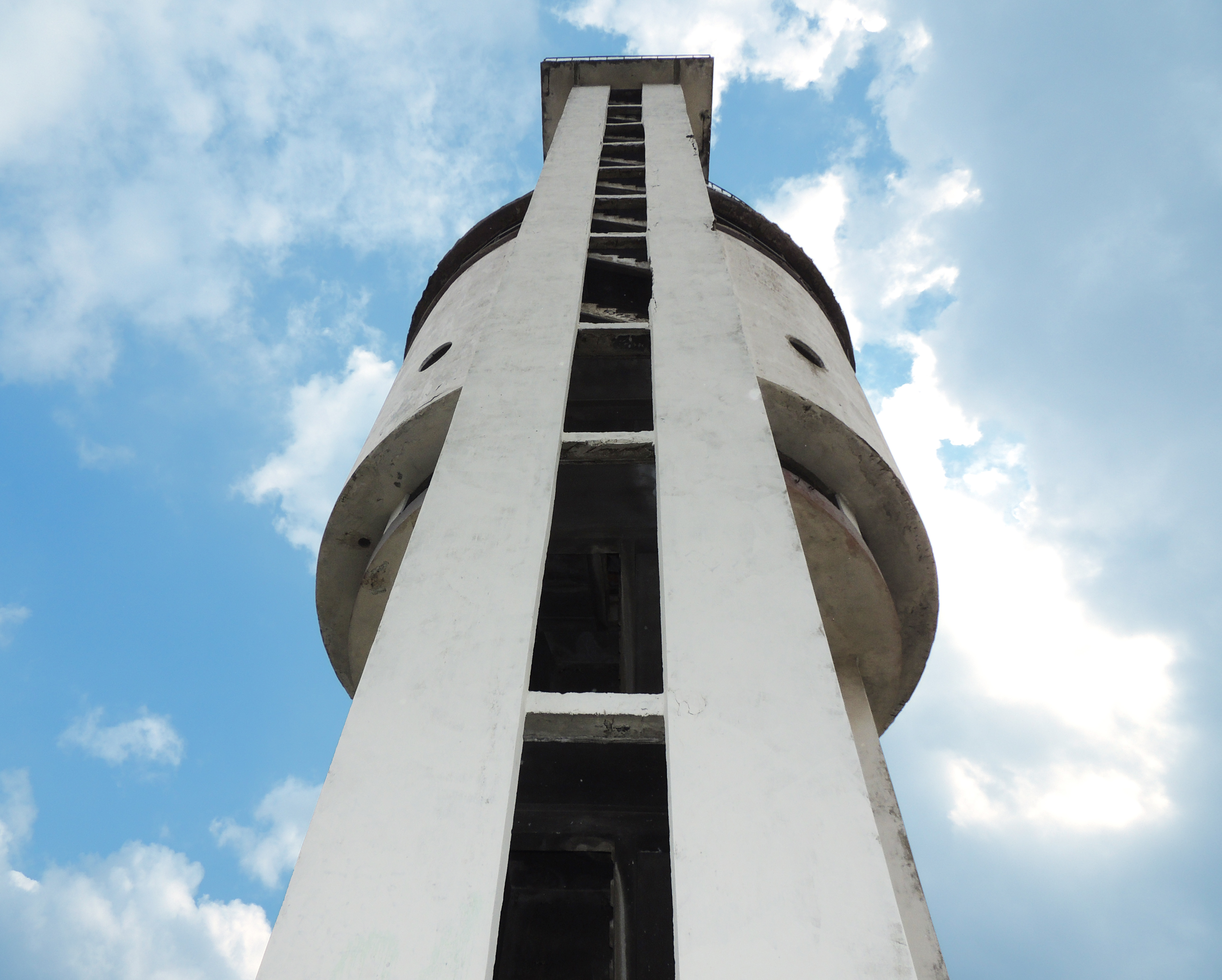 Башня водонапорная (Свердловская область, Екатеринбург, Донбасская улица, Культуры улица)